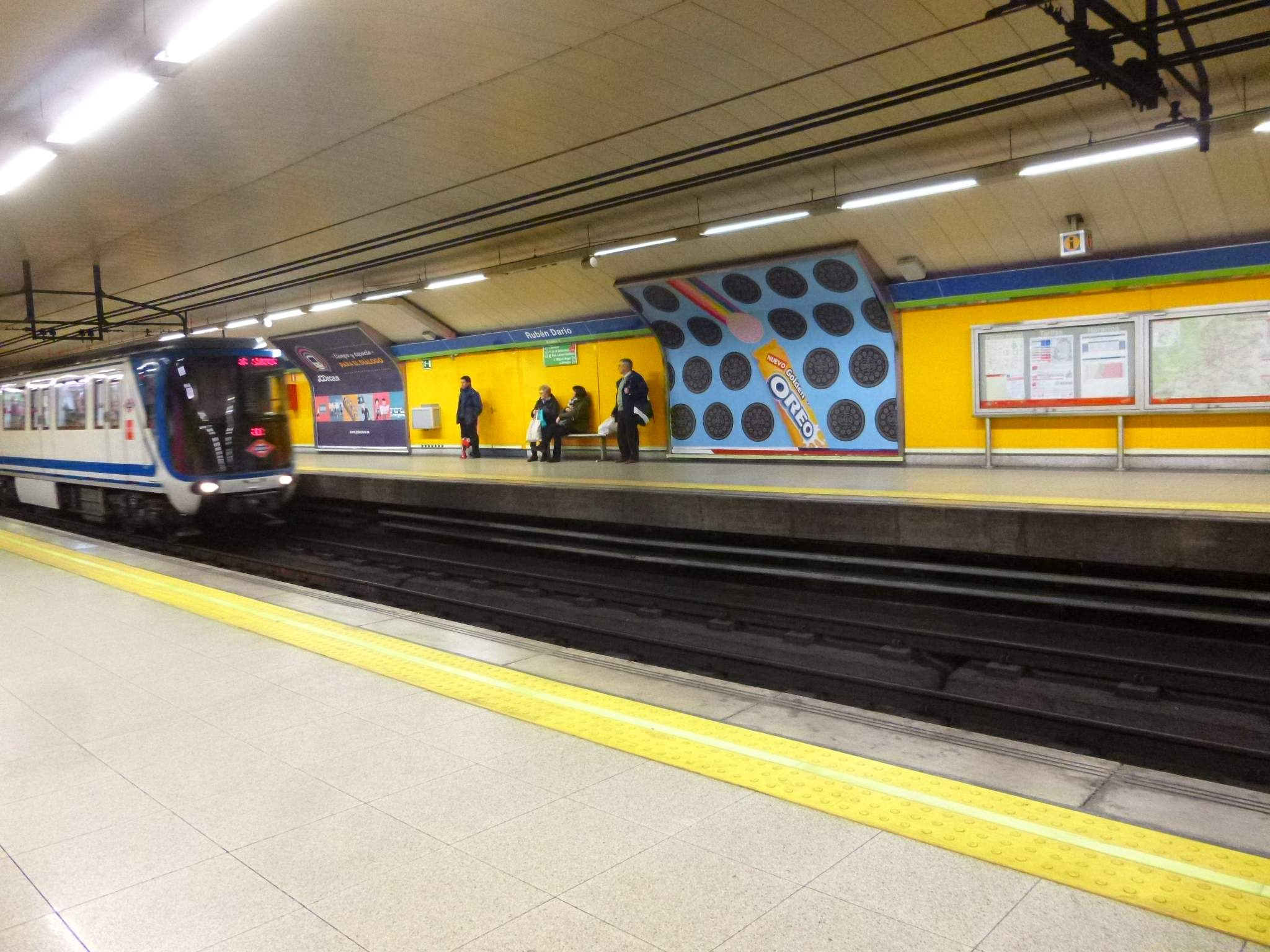 Estación de Rubén Darío, del Metro de Madrid